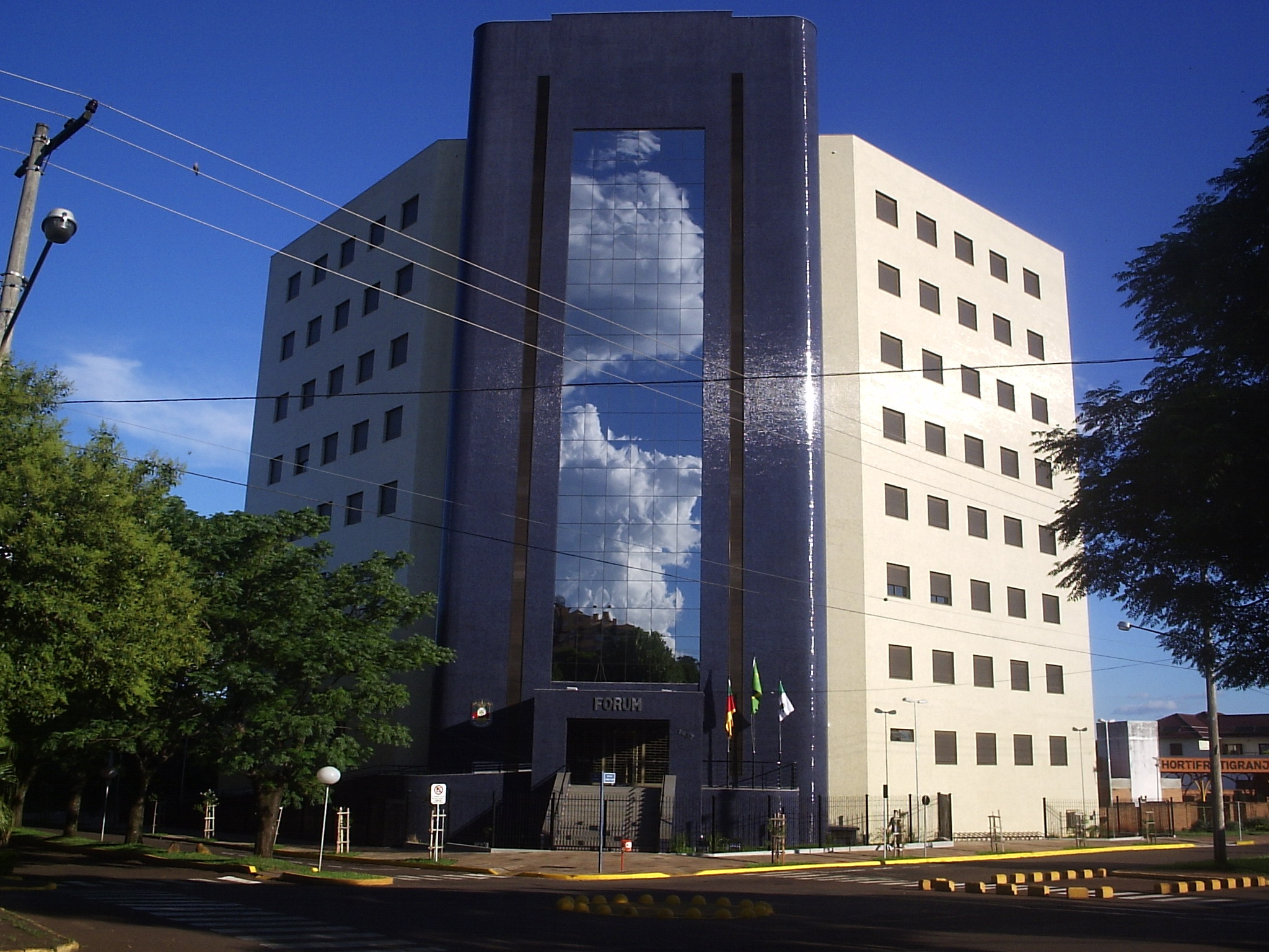 Edifício do novo Fórum, Comarca de Santo Ângelo, Rio Grande do Sul, Brasil